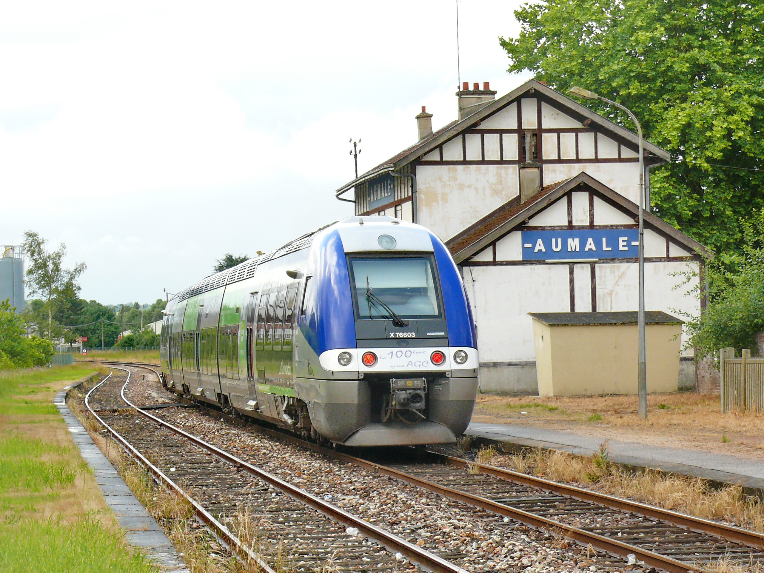 Autorail X 76603 en gare d'Aumale